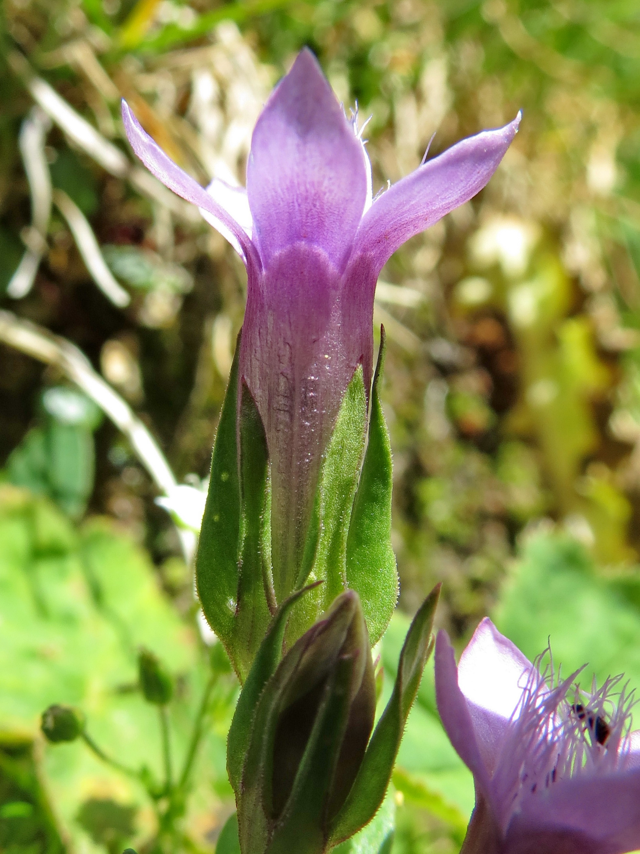 Gentianella anisodonta, Corvara in Badia, Dolomiti, Italia